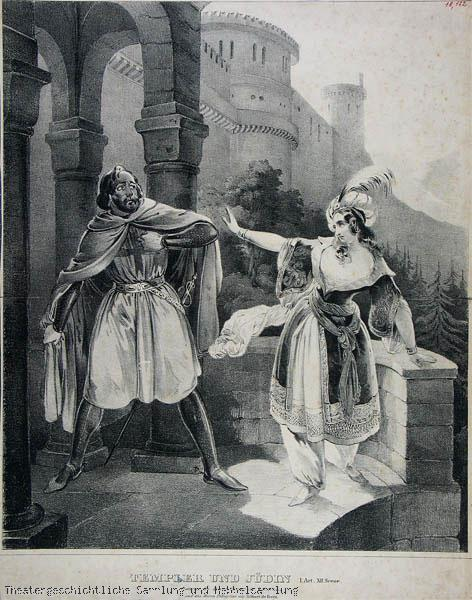 Der Templer und die Jüdin I. Act, XII. Scene; Lithographie; 40,8 cm x 31,9 cm Rollenporträts von Wilhelmine Hasselt-Barth (1813-1881) und Julius Pellegrini (1806-1858) als "Rebecka" und "Gilbert de Boys" in Marschners Oper "Templer und Jüdin". Theatergeschichtliche Sammlung und Hebbelsammlung, Kiel, Inventarnummer: G464